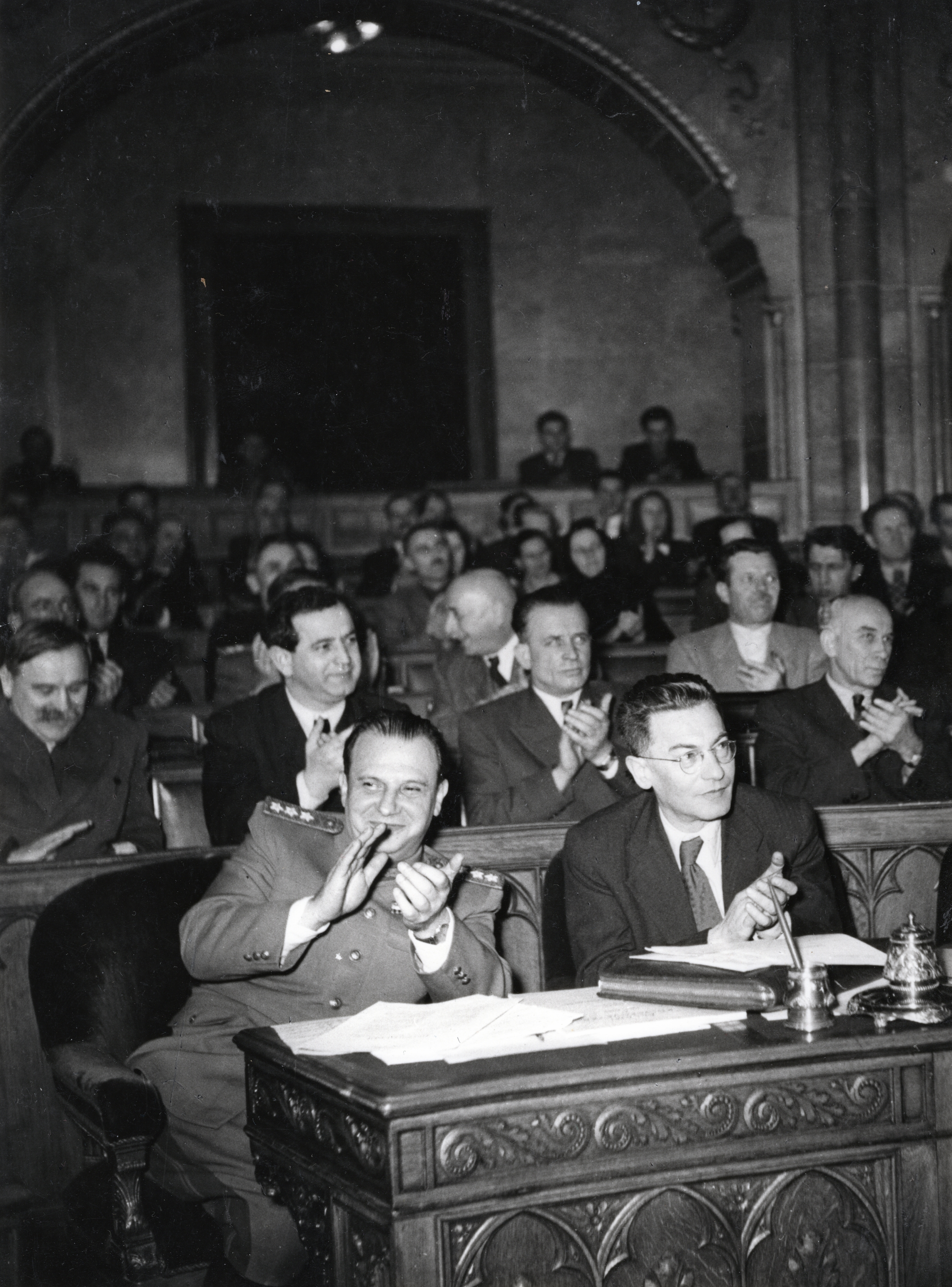 Parlament. Az első sorban balra Farkas Mihály, jobbra Révai József, a második sorban bal szélen Veres Péter, jobb szélen Harustyák József.